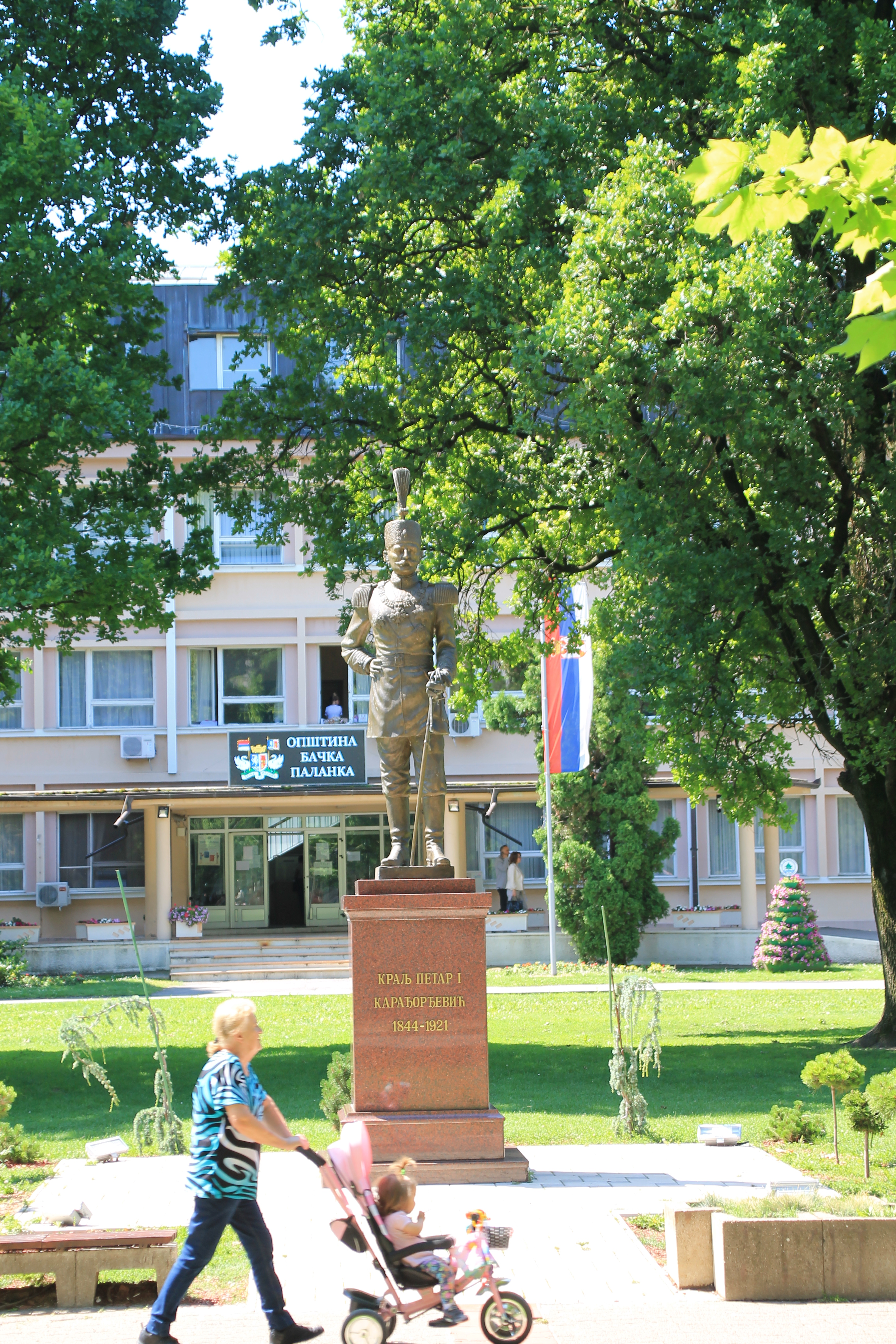 Spomenik kralja Petra I Karađorđevića